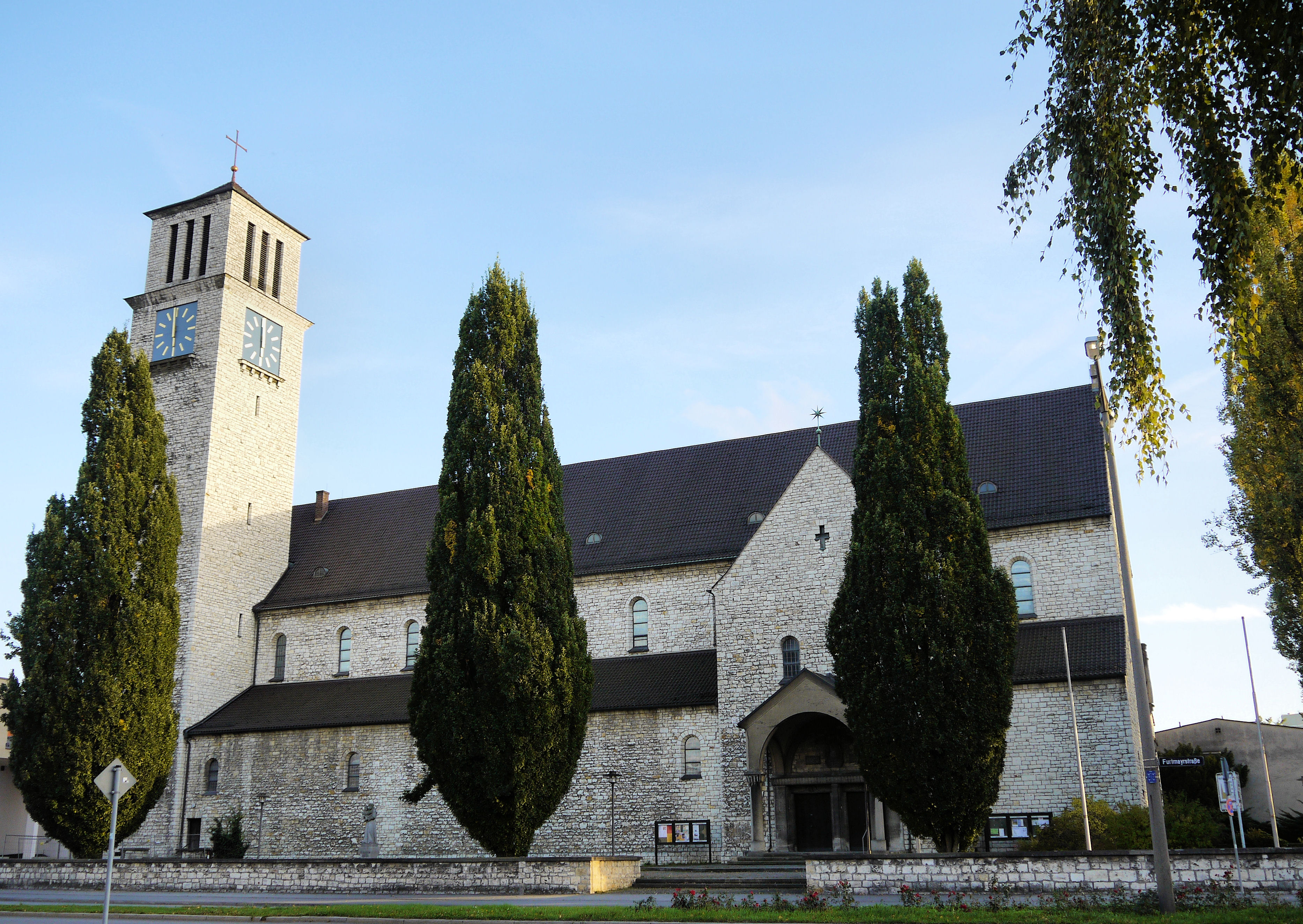 Pfarrkirche St. AntonThis is a photograph of an architectural monument.